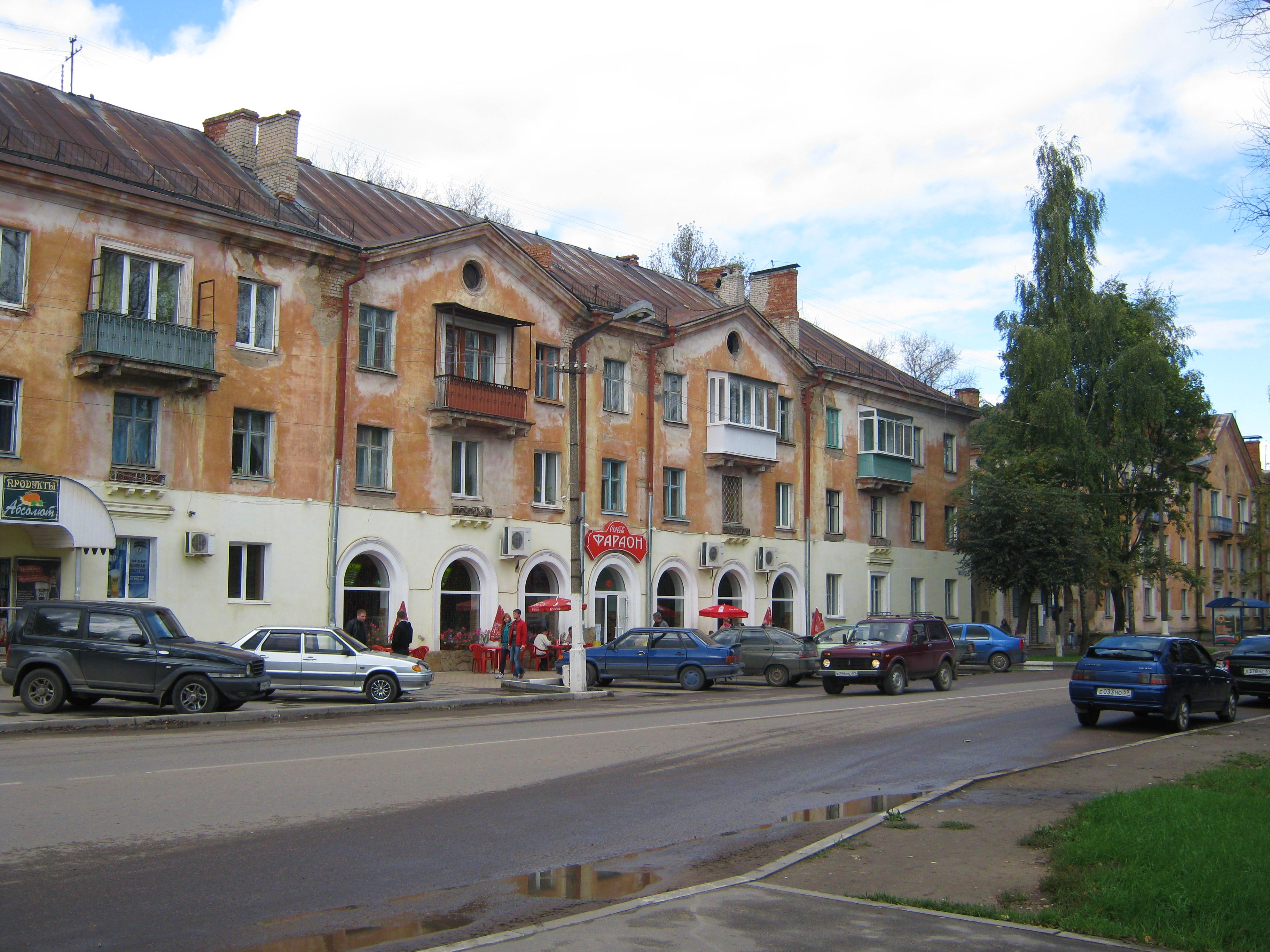 Дом №8, кафе «Фараон» (Ржев)